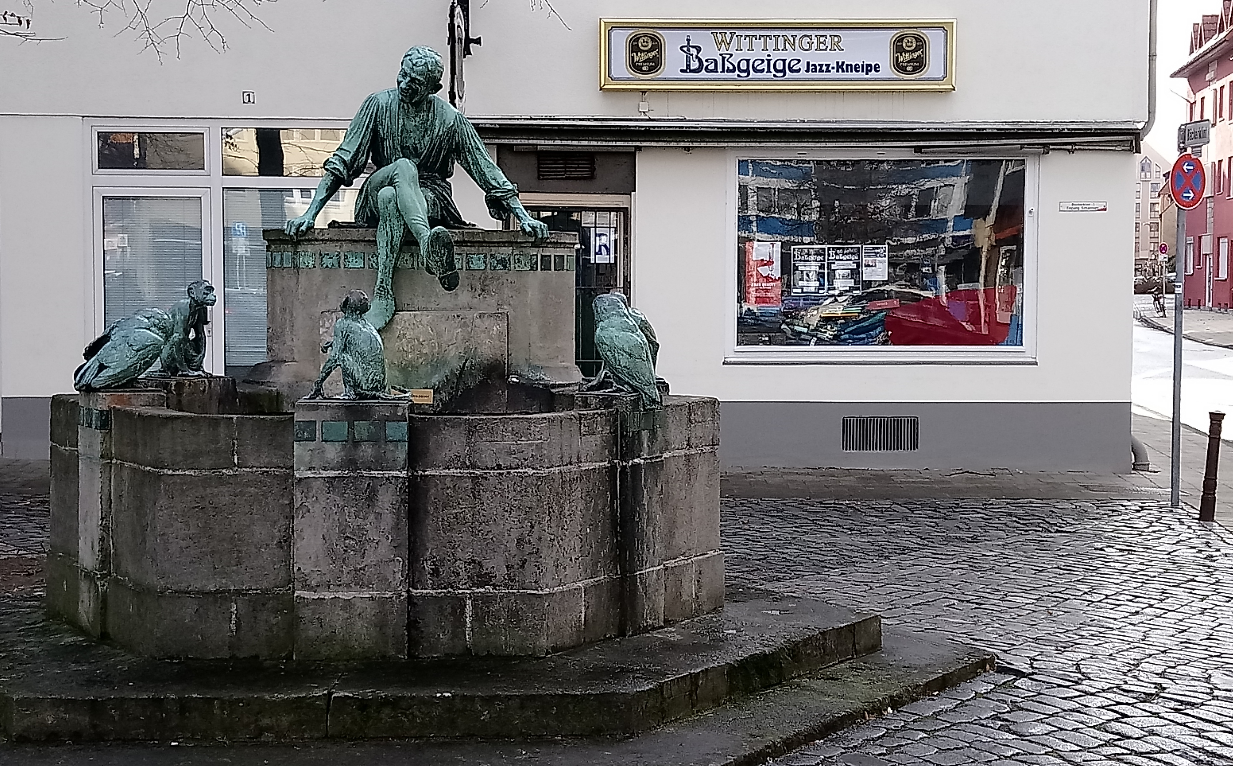 Braunschweig, Bäckerklint: Eulenspiegelbrunnen, im Hintergrund die 1977 von Norbert „Bolle“ Bolz (8. September 1947 – 6. Februar 2019) eröffnete Jazz-Kneipe „Baßgeige“.